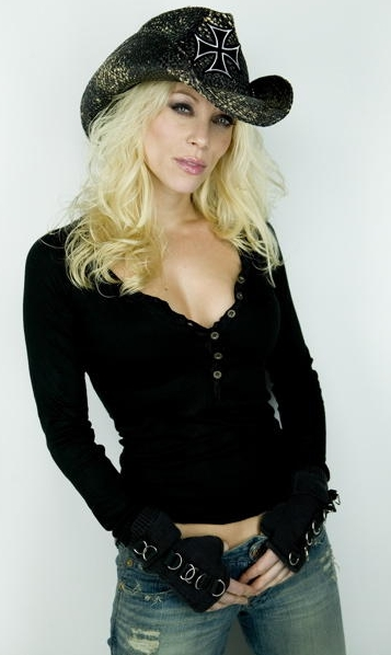 Angela Gossow, 10 April 2008.